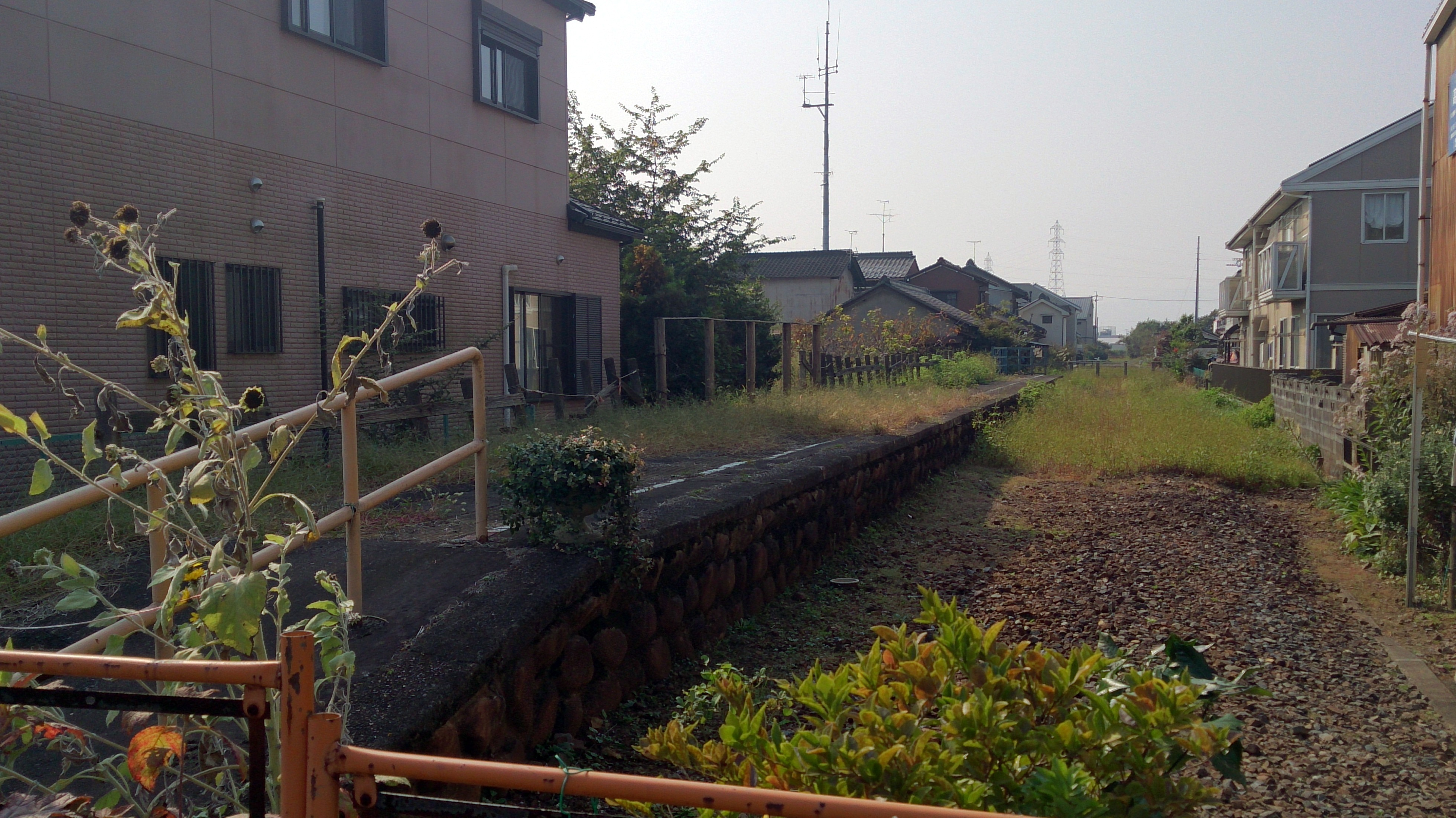 未だホームだけは残されている。